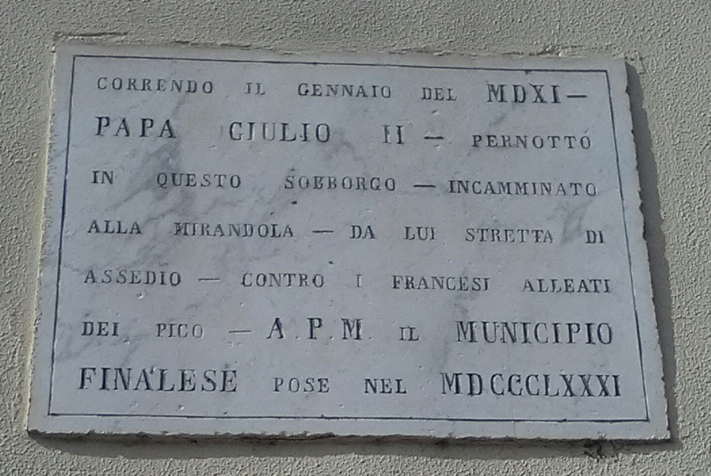 Lapide posta in ricordo di Giulio II in passaggio Finale Emilia verso Mirandola per l'assedio del 1511 (Via dei Cappuccini n° 25) CORRENDO IL GENNAIO DEL MDXI -PAPA GIULIO II - PERNOTTÒIN QUESTO SOBBORGO - INCAMMINATOALLA MIRANDOLA - DA LUI STRETTA DIASSEDIO - CONTRO I FRANCESI ALLEATIDEI PICO - A.P.M. IL MUNICIPIOFINALESE POSE NEL MDCCCLXXXI